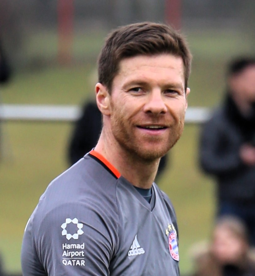 Xabi Alonso am 14. März 2017 beim Training auf dem Gelände des FC Bayern München